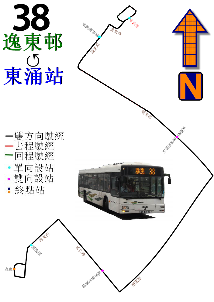 中文（香港）: 新大嶼山巴士38線的走線圖